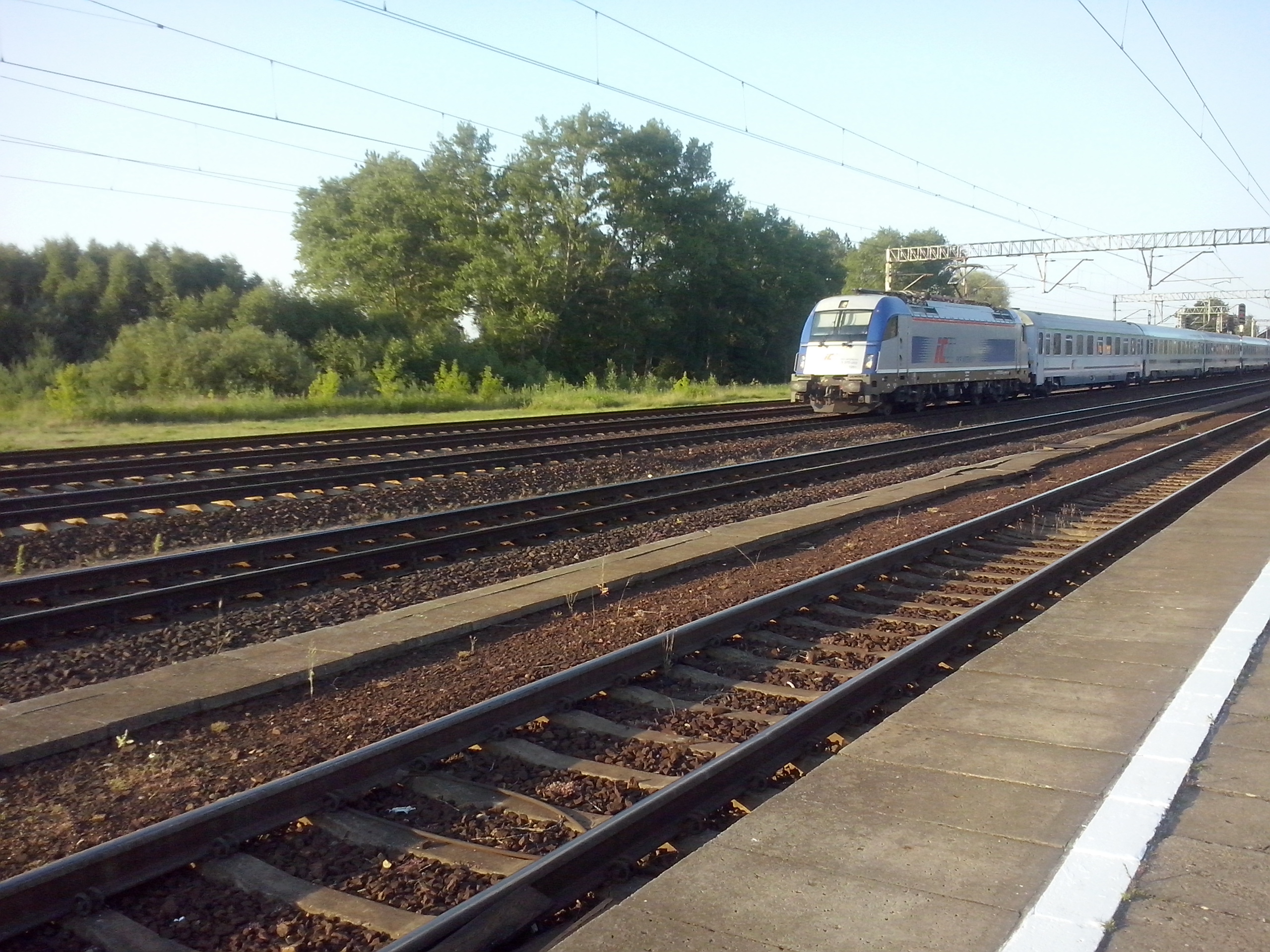 Pociąg IC przejeżdżajacy przez stację w Barłogach